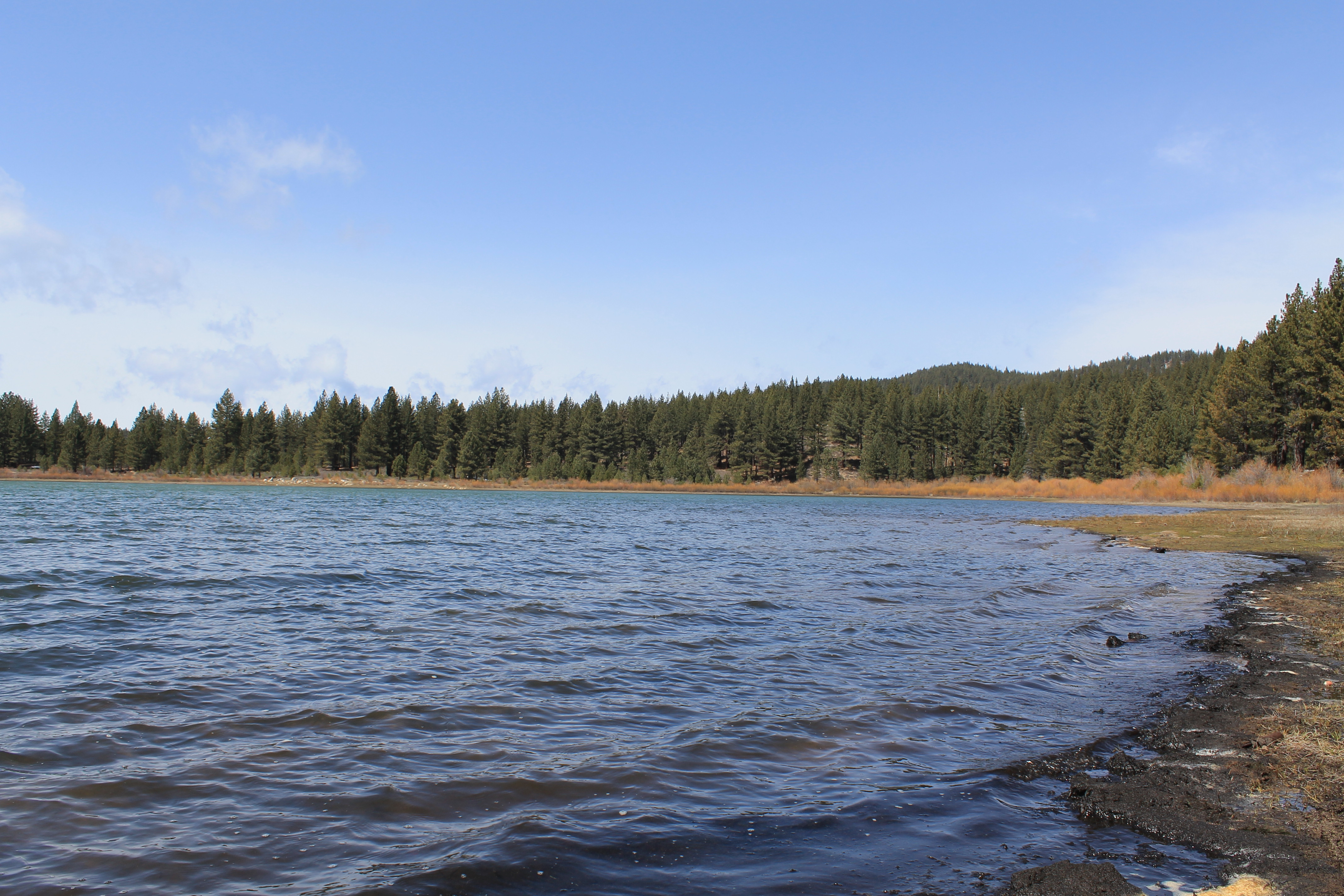 Spooner Lake